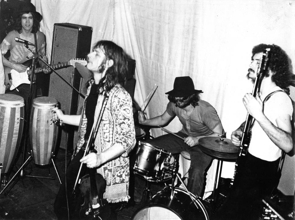 Auftritt im PN-Club. Foto